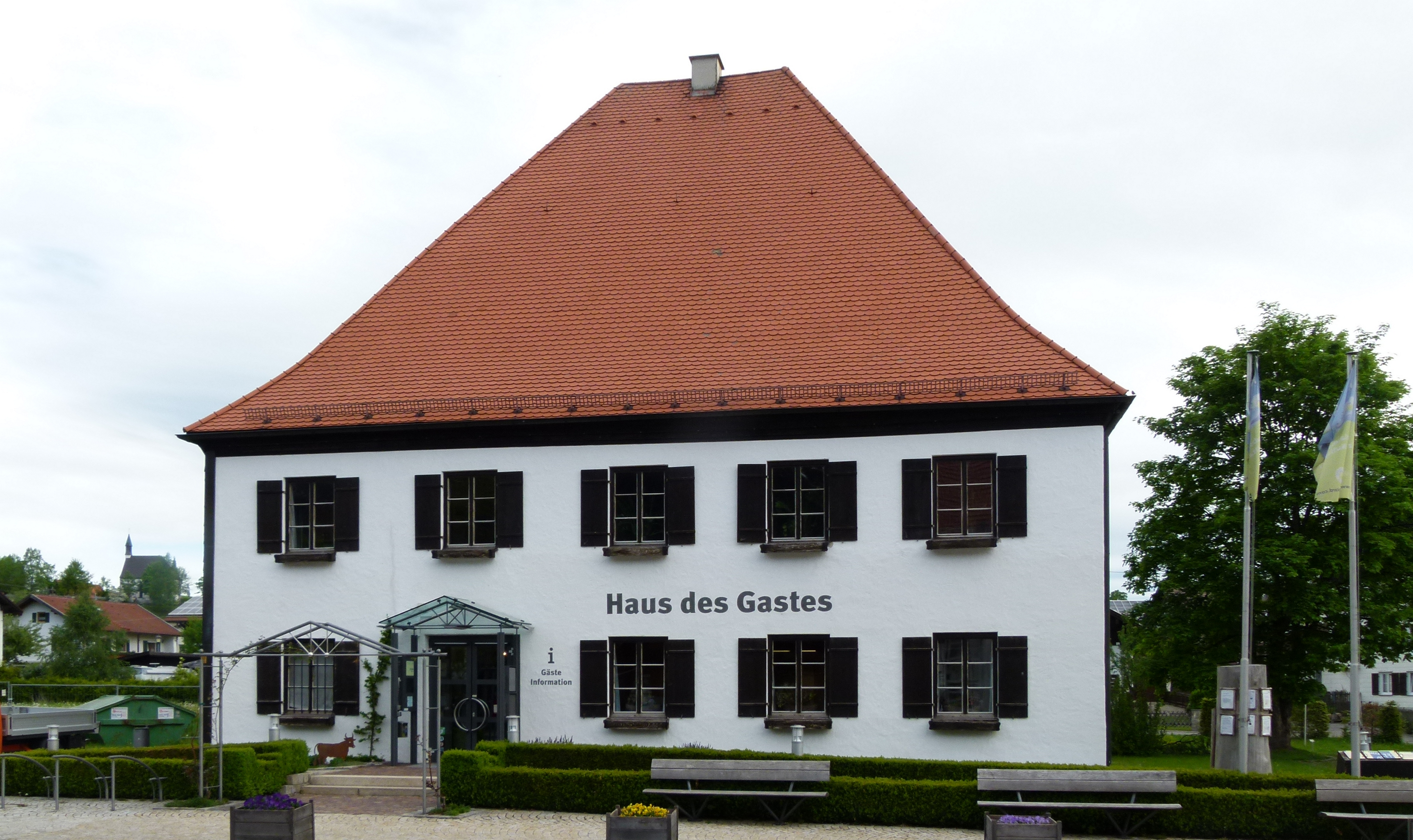 ehem. Schule in Pfronten-Ried, nun Haus des Gastes